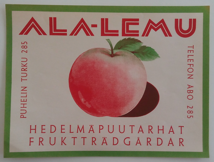 Omenatarhan ilmoitus